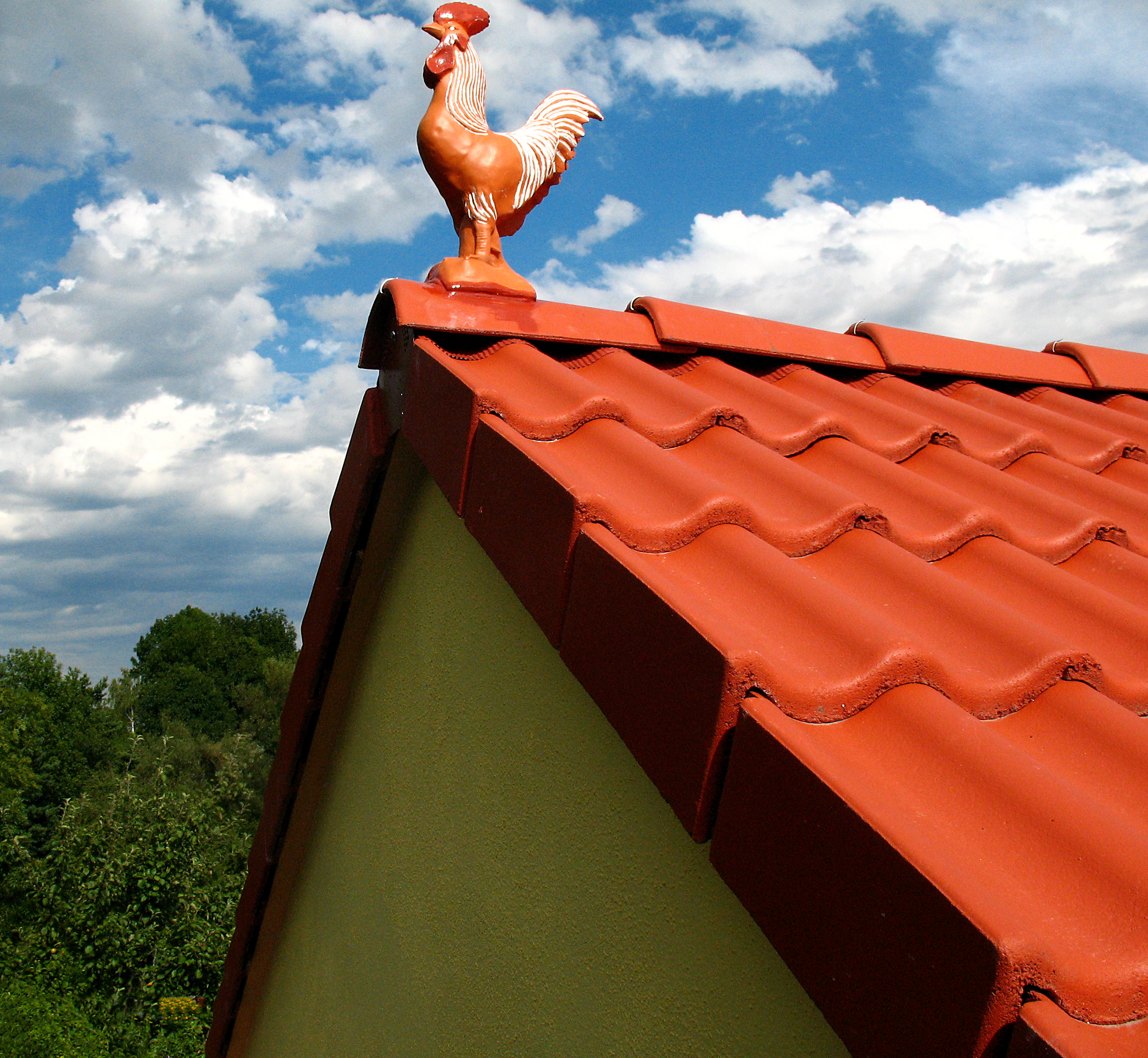 Ortgang mit Dachfirst und Dachfigur